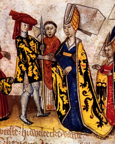 Sňatek Jana Brabantského a Markéty z Dampierre